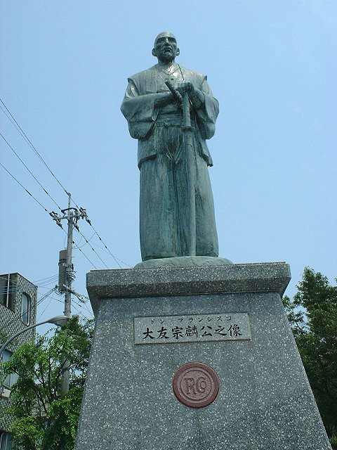 ドン・フランシスコ 大友宗麟公像 大分県津久見市 津久見駅前 2003年8月5日 Bakkai撮影